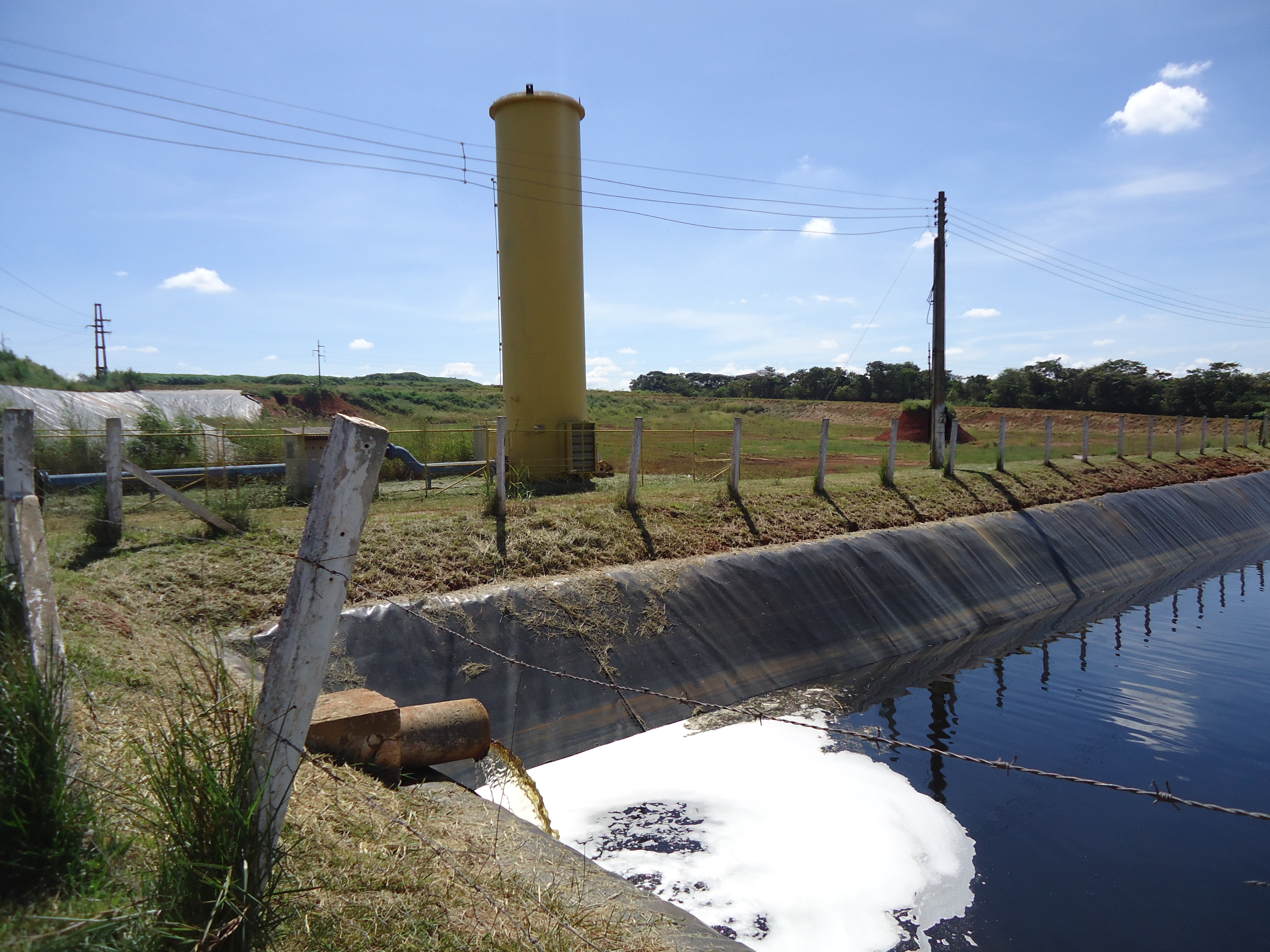 Aterro Sanitário de Goiânia.